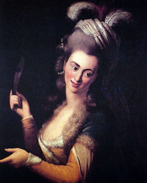 Aloysia Weber as Zémire in André Grétry's opera Zémire et Azor circa 1784